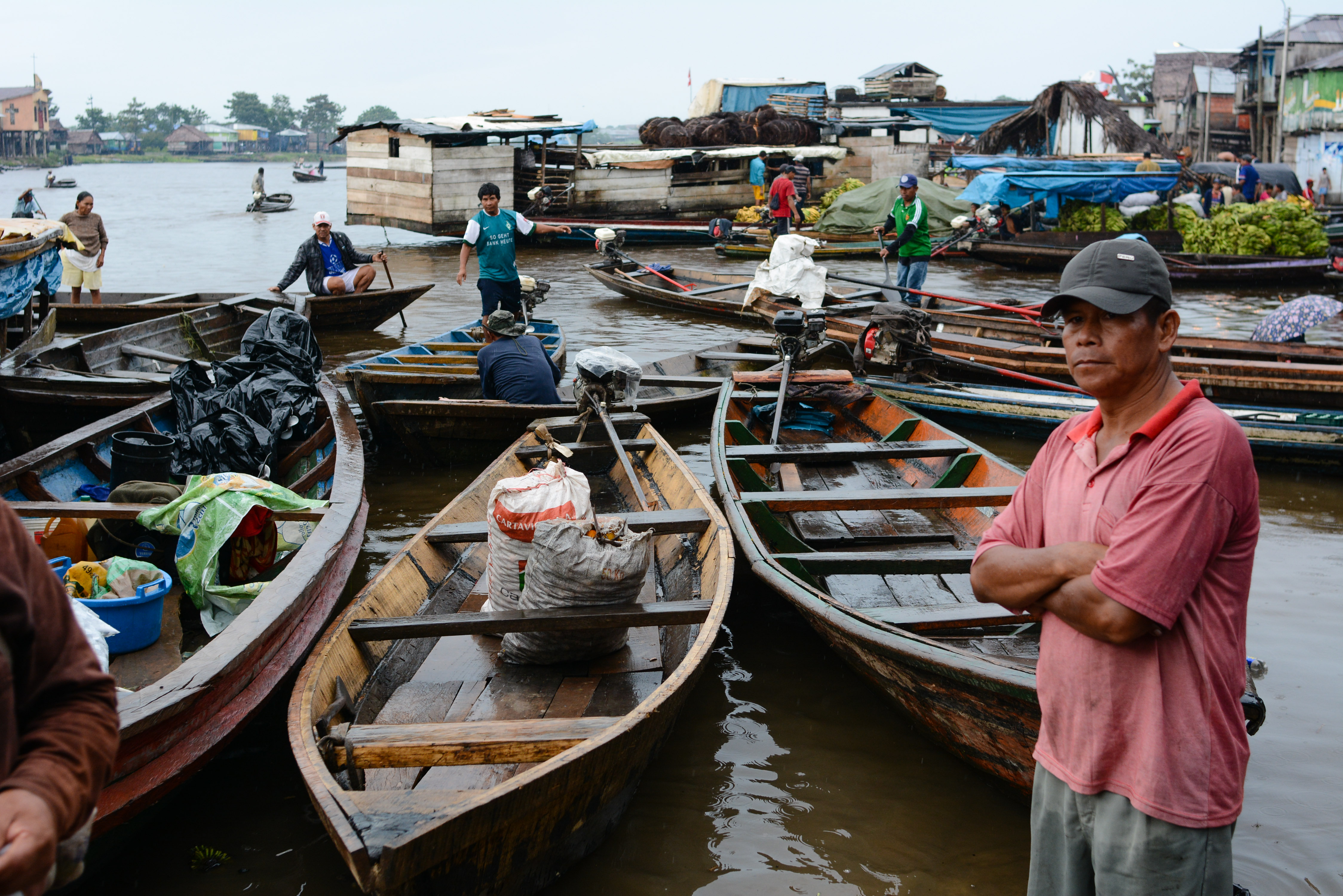 Belen, Iquitos